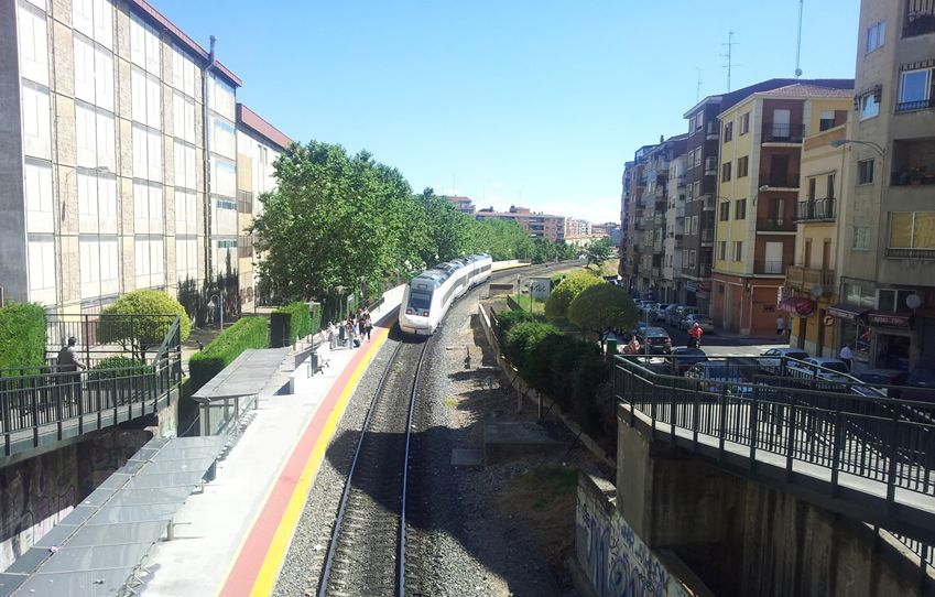 Estación de La Alamedilla (Salamanca).